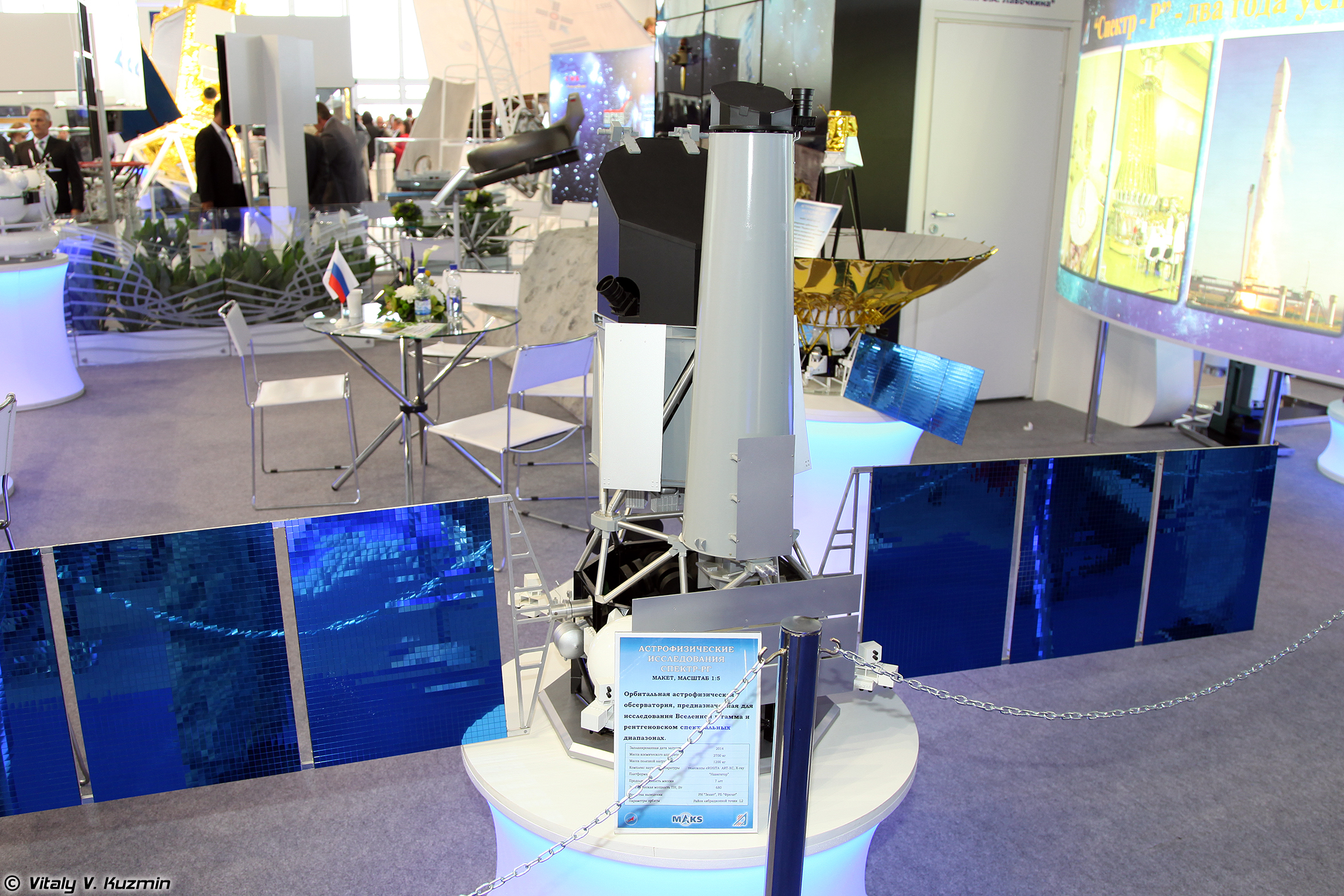 Космический аппарат Спектр-РГ (Spektr-RG spacecraft)